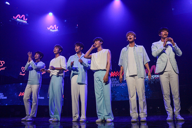 09월 26일 뮤콘 쇼케이스 MUCON Showcase 스누퍼(SNUPER)